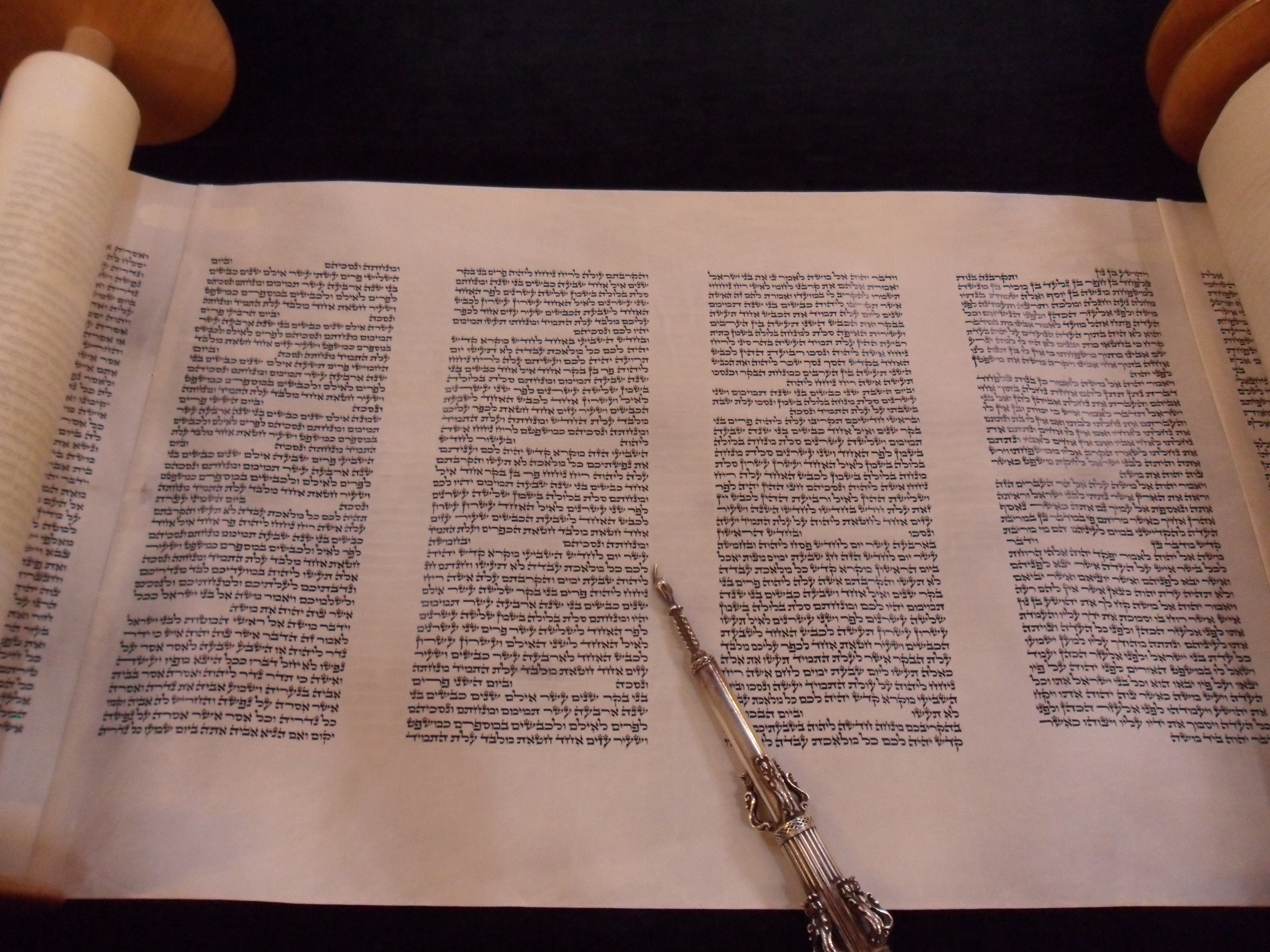 Rouleaux de la Torah dans la synagogue Beth Yaacov accompagnés d'un yad